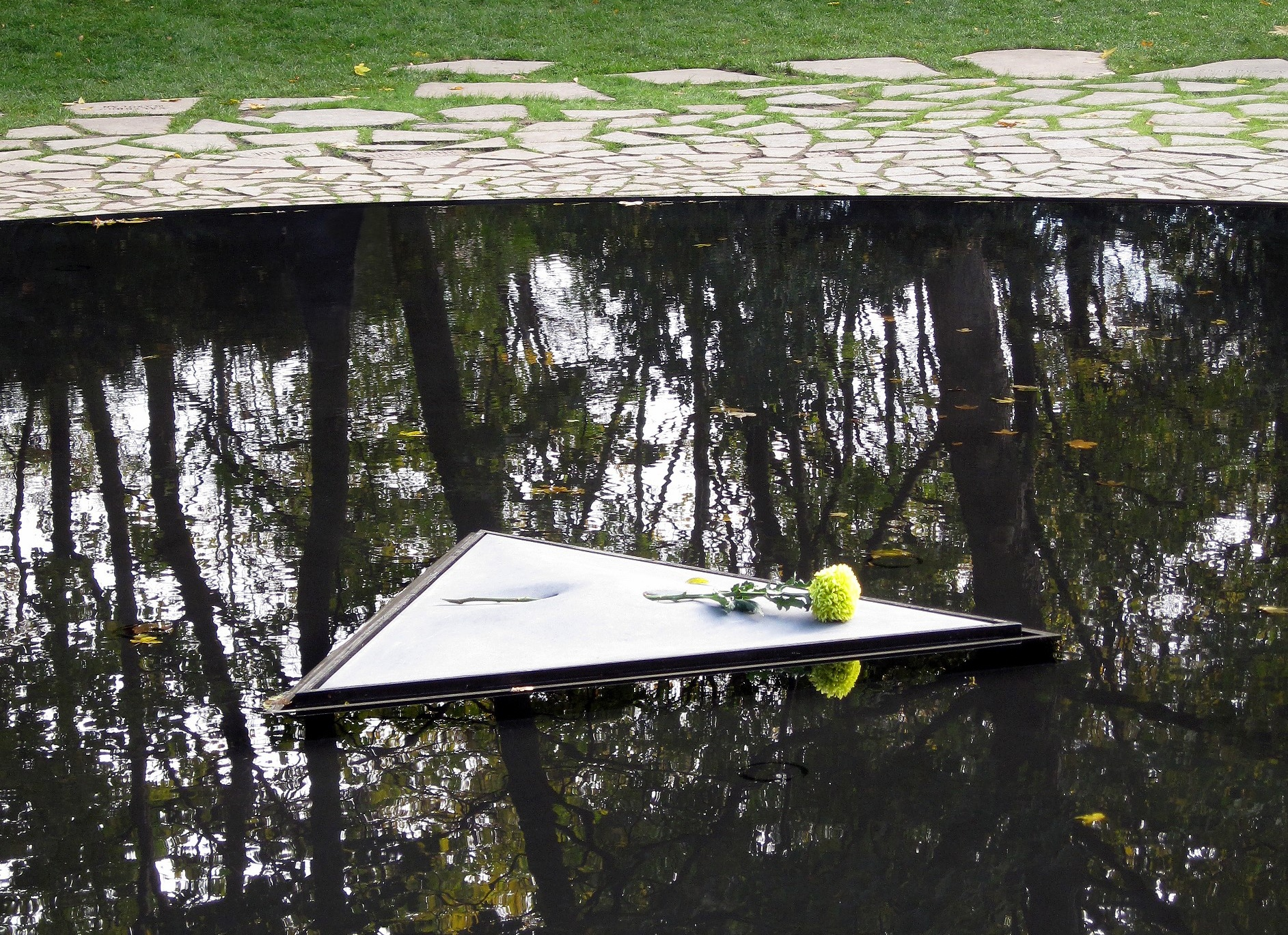 Gedenkstätte Denkmal für die im Nationalsozialismus ermordeten Sinti und Roma Europas in Berlin-Tiergarten südlich des Reichstagsgebäudes.